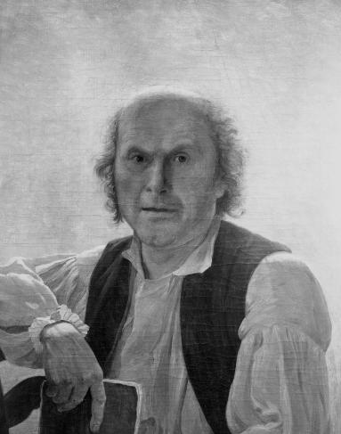 Léonard Defrance, autoportrait 1785